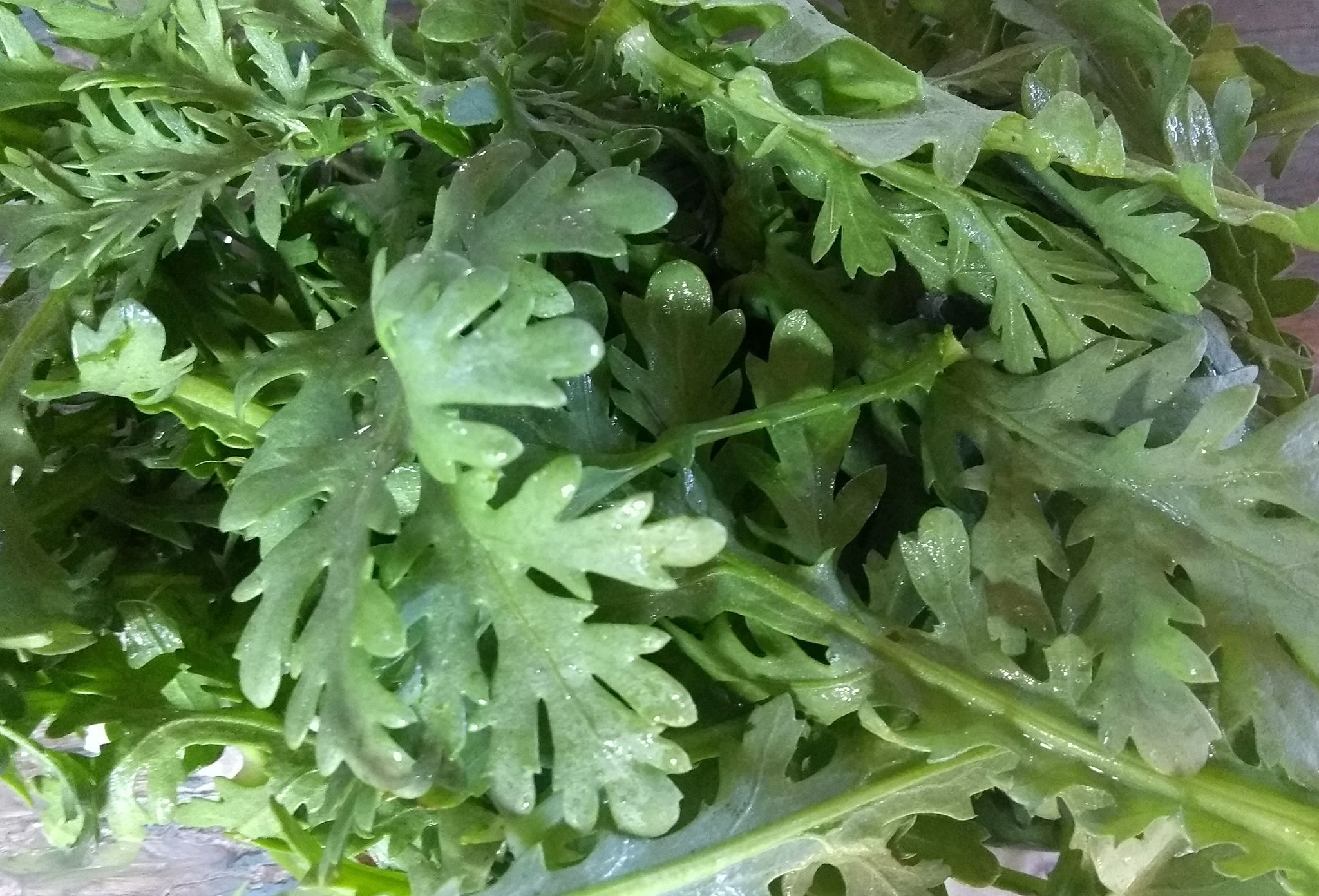 shungiku - Chrysanthemum coronarium